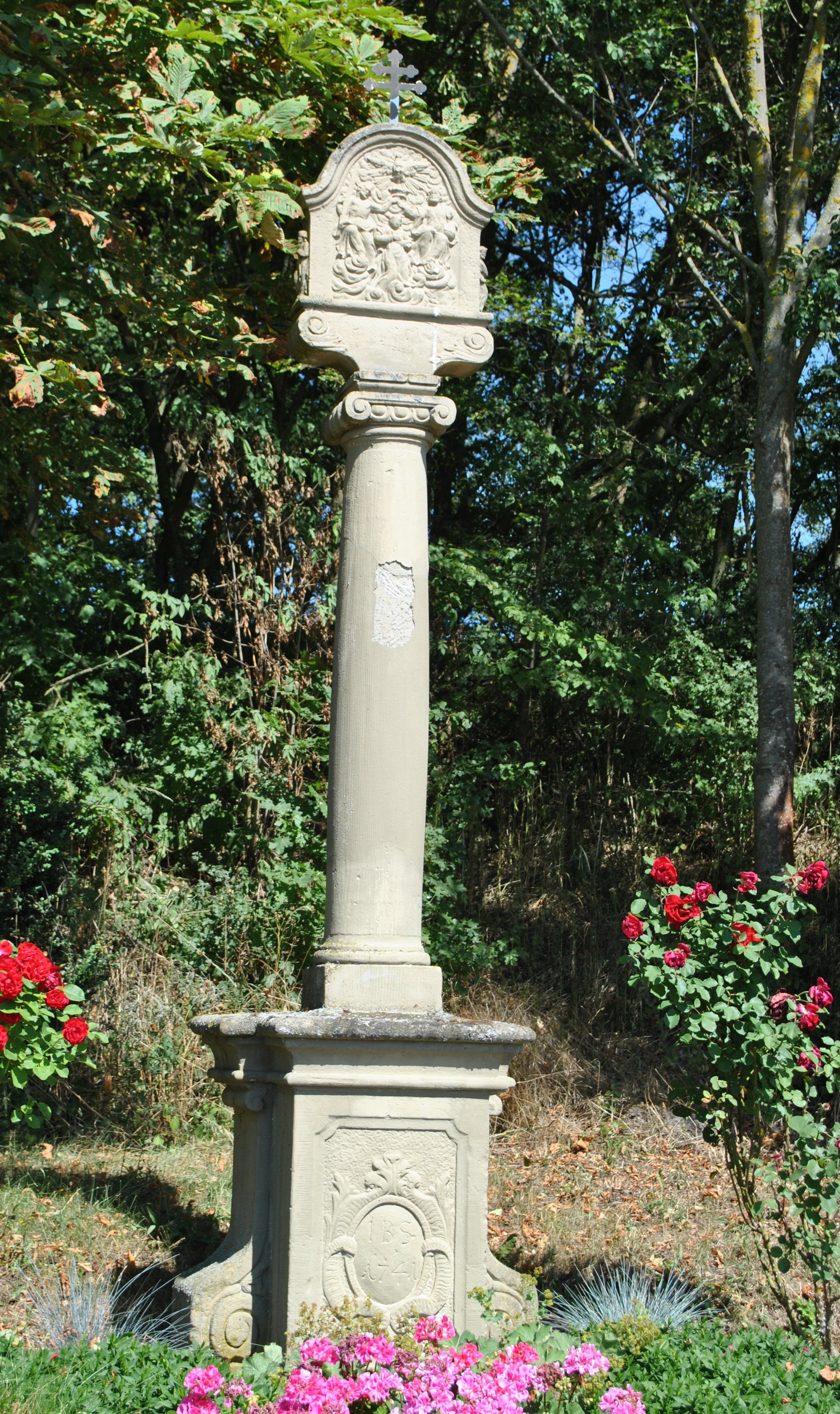 Bildstock, Järkendorf 1741, Rundsäule